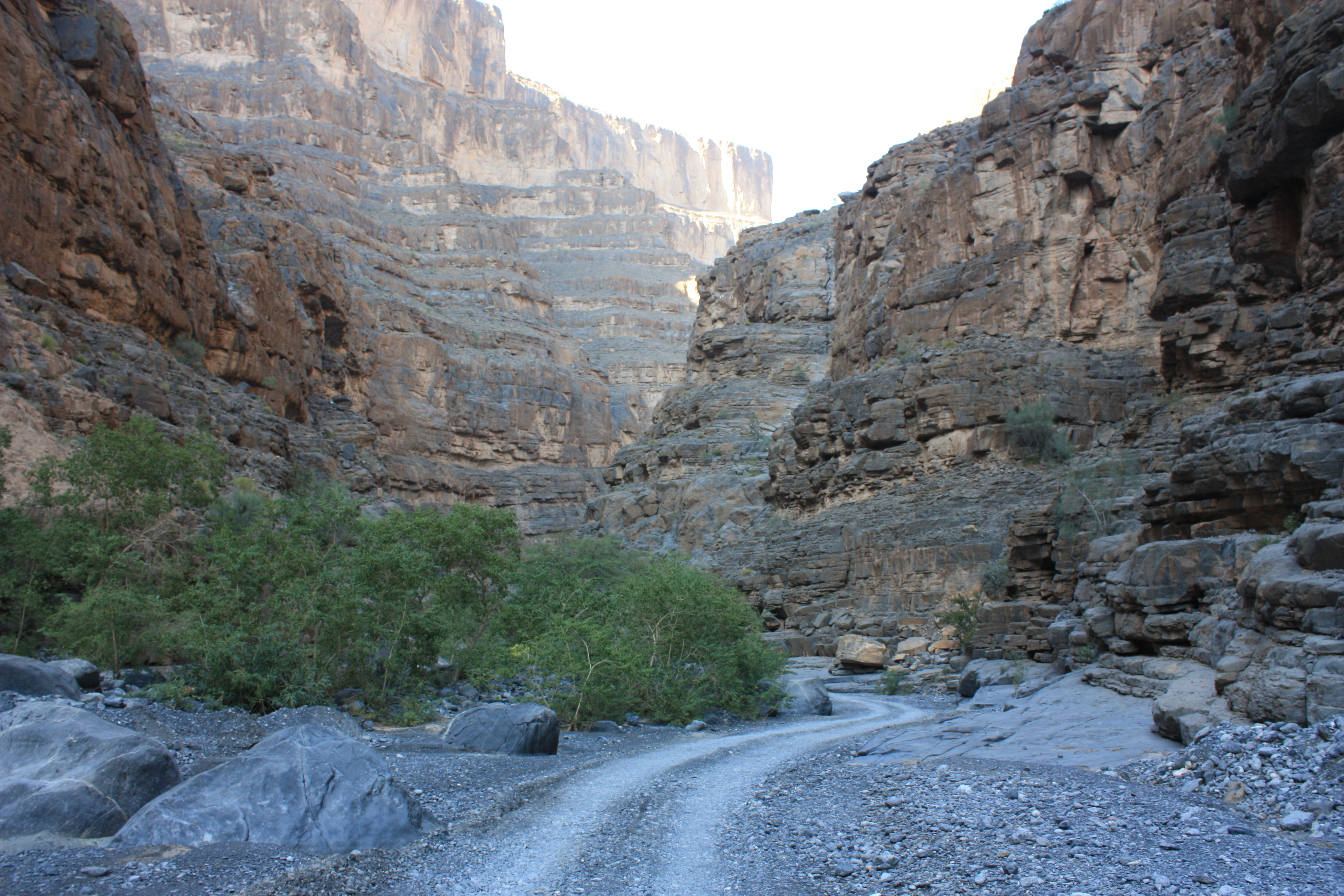 Wadi An Nakhur